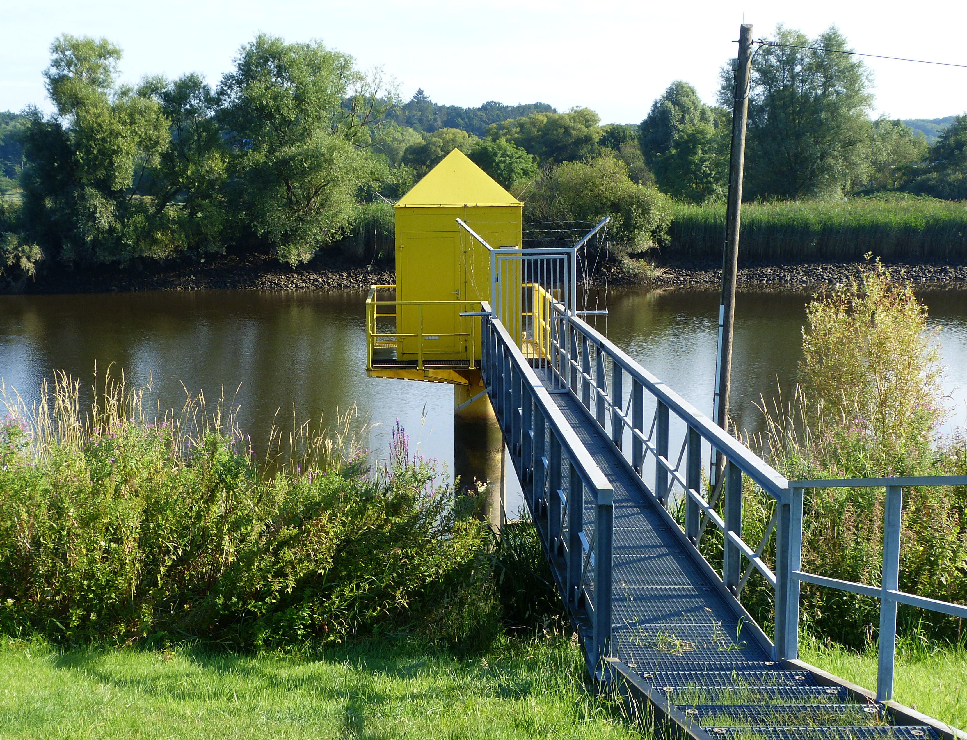 Kavernenfeld Lesum; Entnahmebauwerk an der Lesum, von Süden